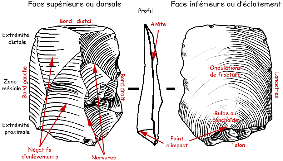 Éclat de silex avec ses éléments morphologiques et descriptifs